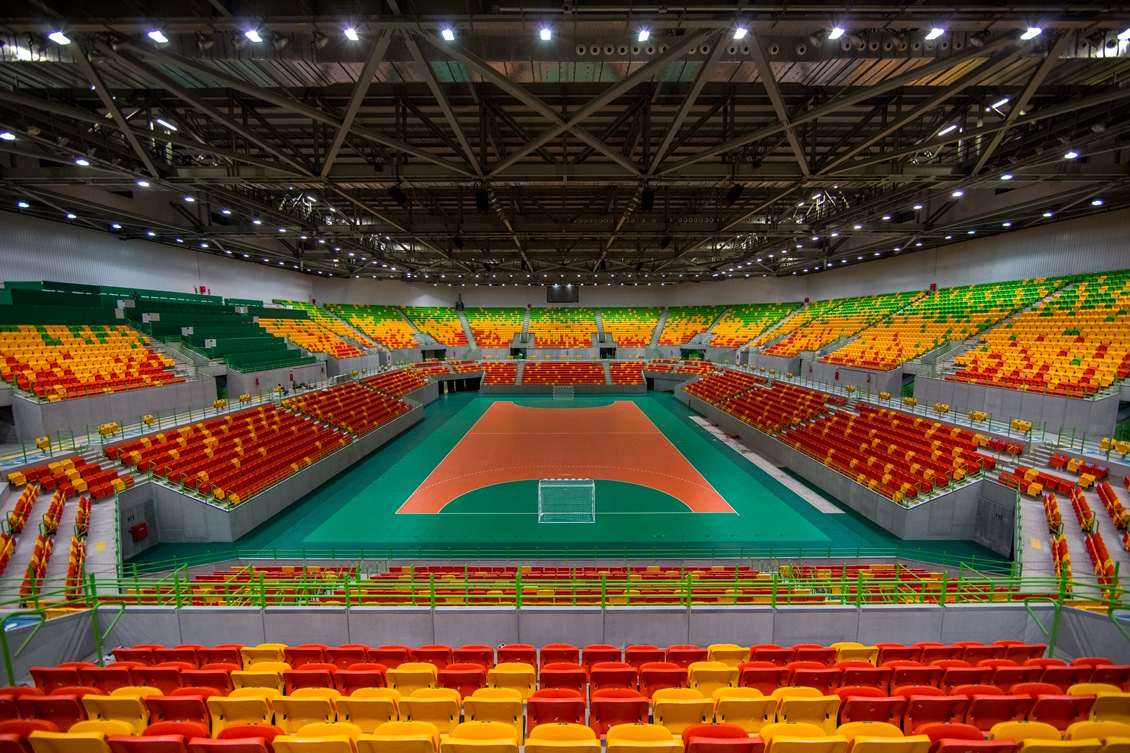 Interno dell'Arena do Futuro di Rio de Janeiro